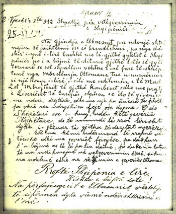 Ne, populli i Elbasanit, pa ndonjë detyrim nga jashtë apo nga brenda , por nga dëshira jonë e lirë bashkë me të gjithë qytetet e Shqipërisë po ia bëjmë të ditur gjithë botës së qytetëruar, se sot e shpallim veten tonë plotësisht të shkëputur nga Mbretëria turke, duke u rreshtuar si një komb i lirë, i cili me ndihmën e të madhit Zot , mbrojtësit të të gjitha kombeve dhe me mbrojtjen e qeverive të Europës shpall se do të qeverisë me nder, drejtësi dhe paanësi të plotë, pa bërë asnjë dallim feje apo dogme. Çdo shqiptar ose i huaj në këtë qeveri shqiptare, do të mundë të rrojë lirisht duke i gëzuar të gjitha të drejtat njerëzore. Edhe ne kemi ndërmend të rrojmë vëllezërisht edhe me shtetet fqinj, pa dashur t’u bëjmë as më të voglin dëm, por duke iu lutur të na ndihmojnë në qeverisjen tonë, sikurse na ndihmuan edhe në rrëzimin e qeverisë turke. Rroftë Shqipëria e lirë! Kështu e bëftë Zoti! Ne, përfaqësuesit e Elbasanit, vërtetojmë të sipërmen, duke vendosur nënshkrimin tonë. Haxhi Hafëz Sulejman Kungulli, zavendës mitropolit Papa Dhimitër Dhimitruka. Aqif Pashë Biçakçiu, Shefqet Bej Vërlaci, Hasan Bej Biçakçiu, Abdulla Bej Tirana, Fuad Bej Kareman Beu(Biçaku), Servet Bej Zylfi, Ismail Bej Xheladin Beu (Taushani), Ali Agjah Bej, Maliq Bej Riza Beu, Demir Bej Sulçe Beu, Refik Myftiu, Mahmut Guma, Xhaferr Pasmaqi, Hysein Sulova, Ruzhdi Alush Saraçi, Beniamin Deliana, Beniamin Nosi, Taq Buda, Kolë Papajani, Lazër Papajani, Serafin Jorgaqi, Haxhi Nikollë Jorgaqi, Mihal Prifti, Dhimitër Paparisto, Emin Haxhiadem Shijaku, Rrapush Demeti, Mahmut Hakani, Hysein Dakli, Jusuf Bej Taushani, Hasan çifte, Ymer Peni, Hysein Hastopalli, Demir Zenelhoxha.